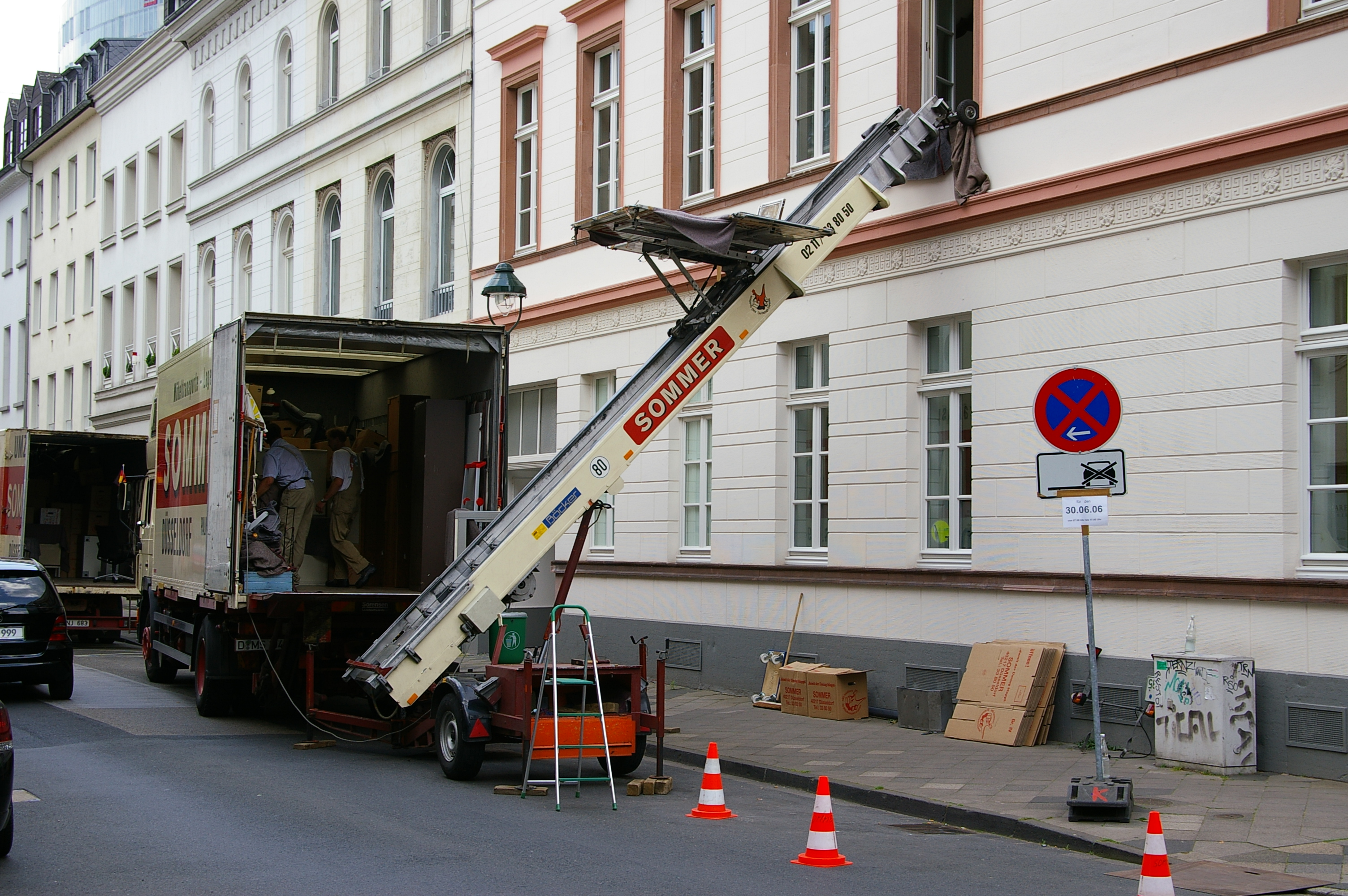 Genehmigung: GFDL (Version 1.2, November 2002), kein wie auch immer geartetes "Gentlemen-Agreement". Bildnutzung ohne Einhaltung der Bestimmungen der GFDL ist kostenpflichtig und wird vom Rechteinhaber in Rechnung gestellt. Zweitlizensierung ggf. auch unentgeltlich auf Anfrage. Es gelten die AGB. Motiv: Umzugslift für den Möbeltransport; Düsseldorf, Südstraße 1